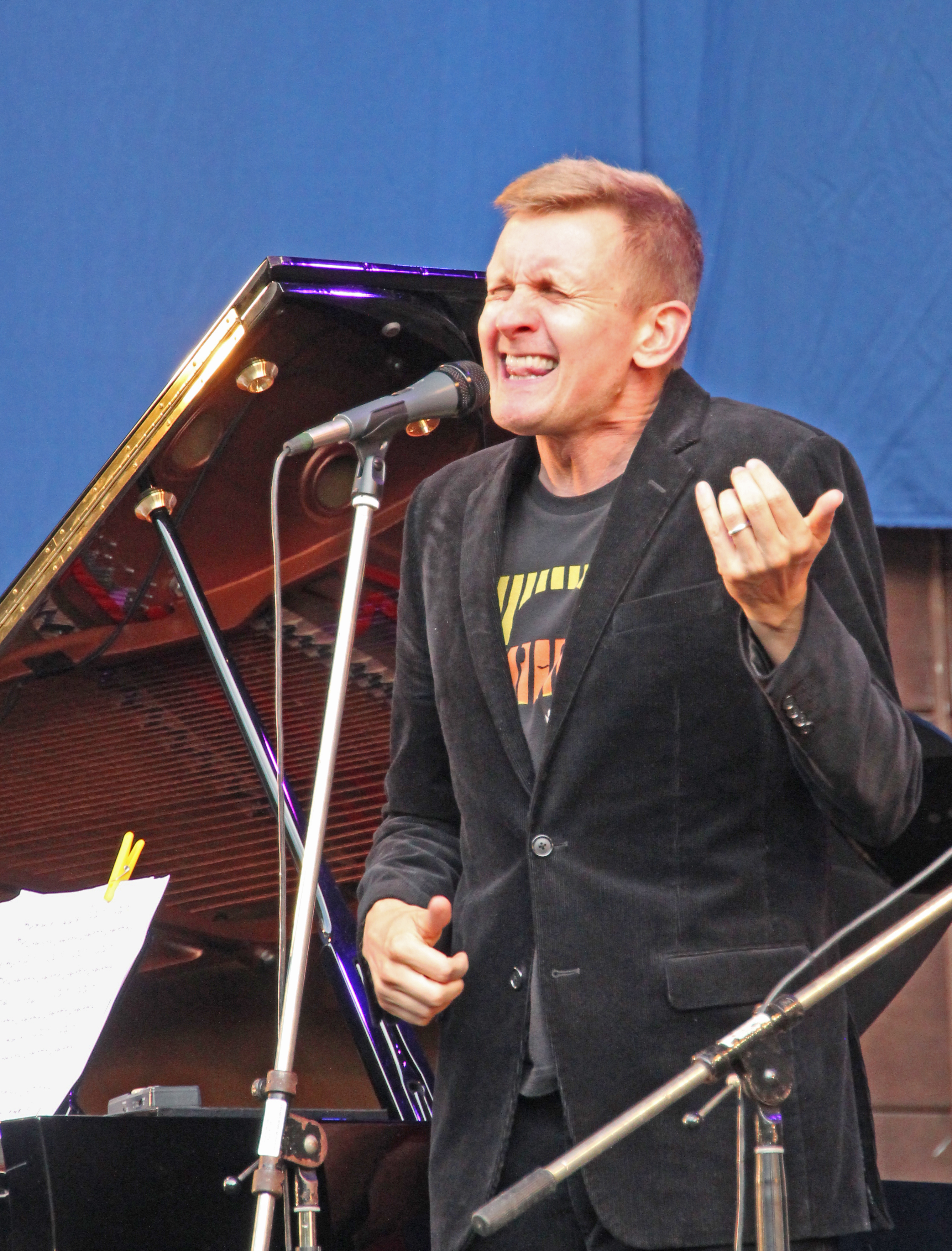 Bildinhalt: Der Jazz-Sänger Michael Schiefel bei einem Auftritt mit Thärichens Tentett im Palmengarten Aufnahmeort: Frankfurt am Main, Deutschland Die dargestellte Person wurde bei einem öffentlichen Auftritt fotografiert.